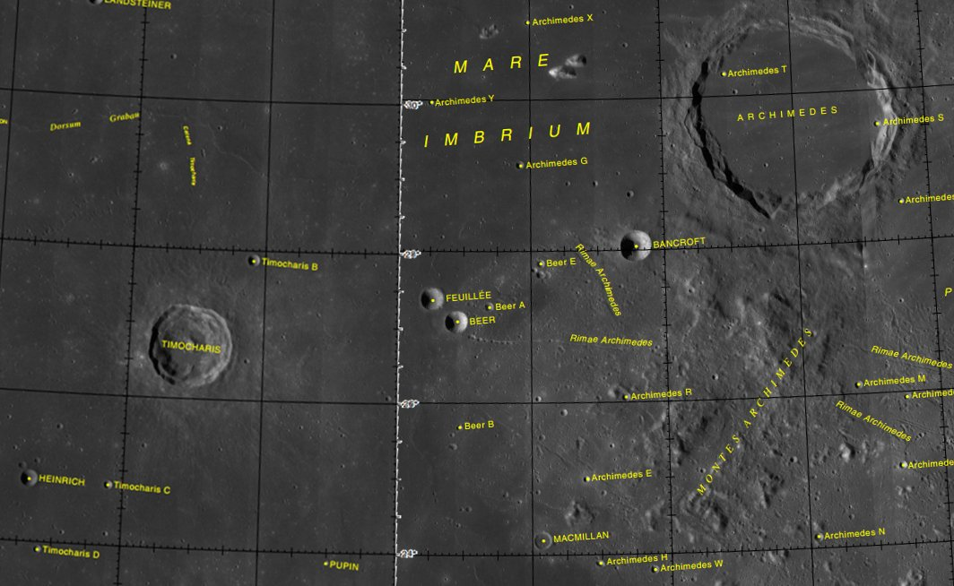 Cráter lunar Feuillée. Localización. (Imagen LROC)